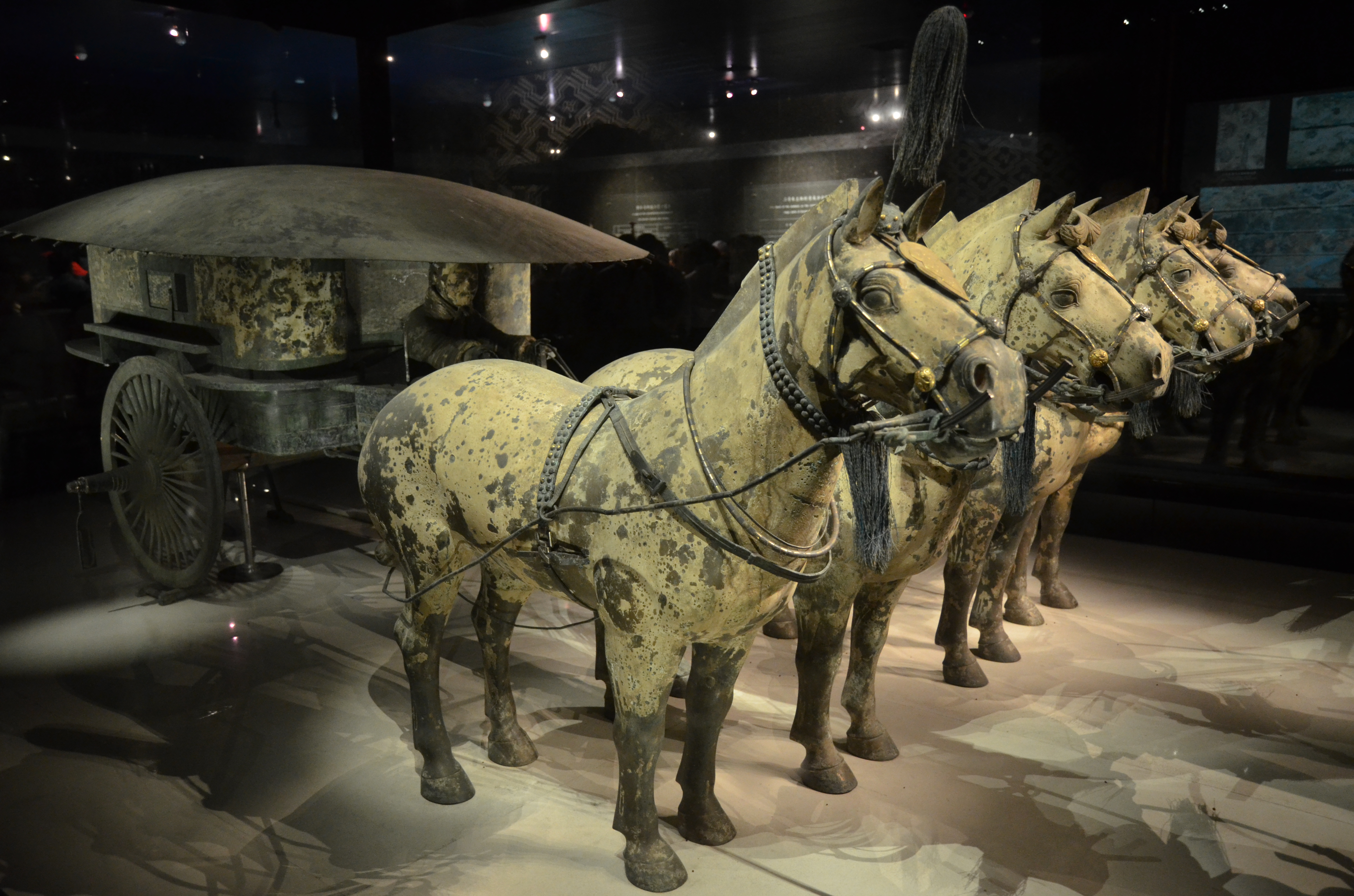 Xi'an - Royal Bronze Wagon